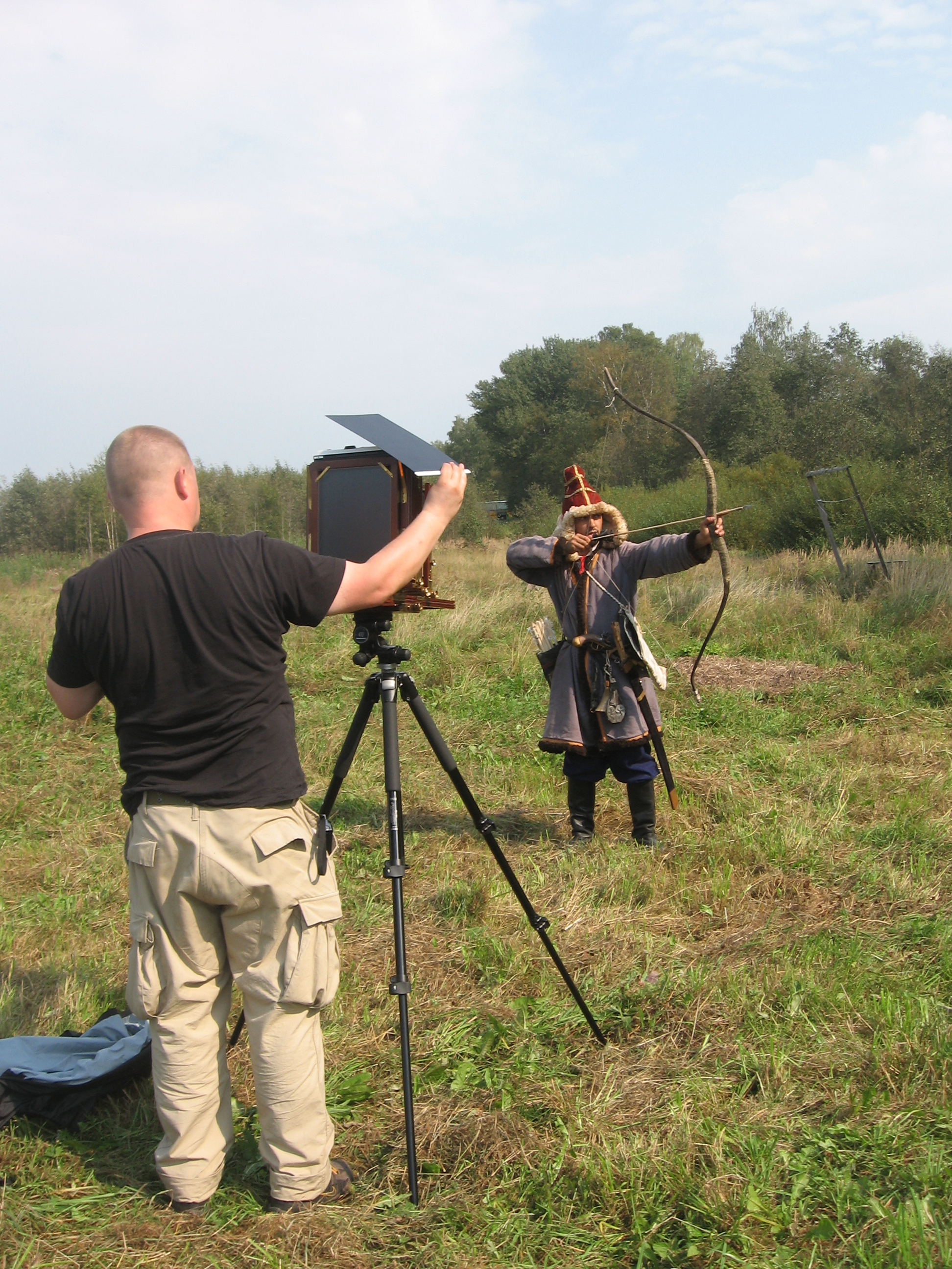 Башҡортса: "Төньяҡ Амурҙары" яугиры